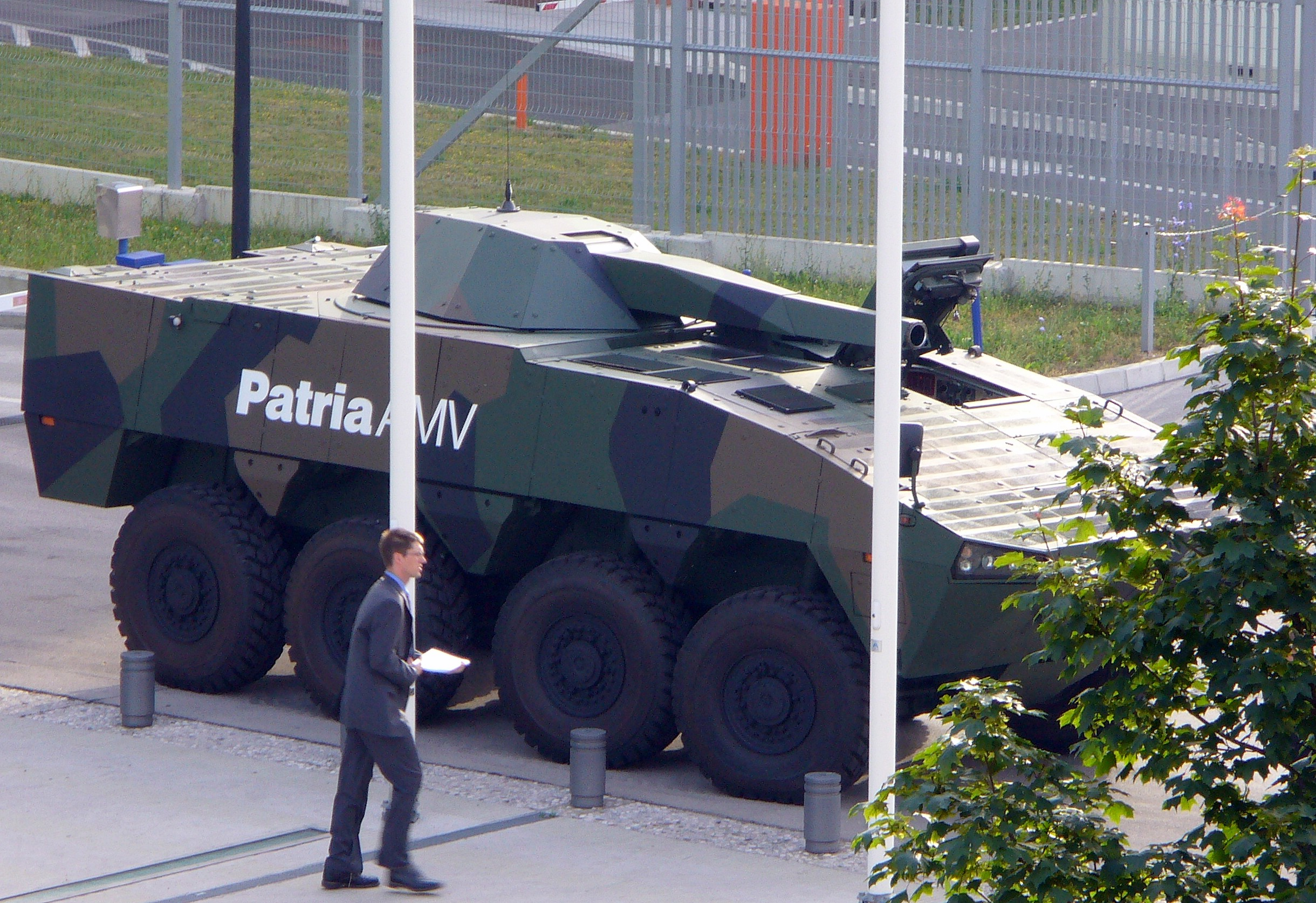 Patria AMV pred Gospodarsko zbornico